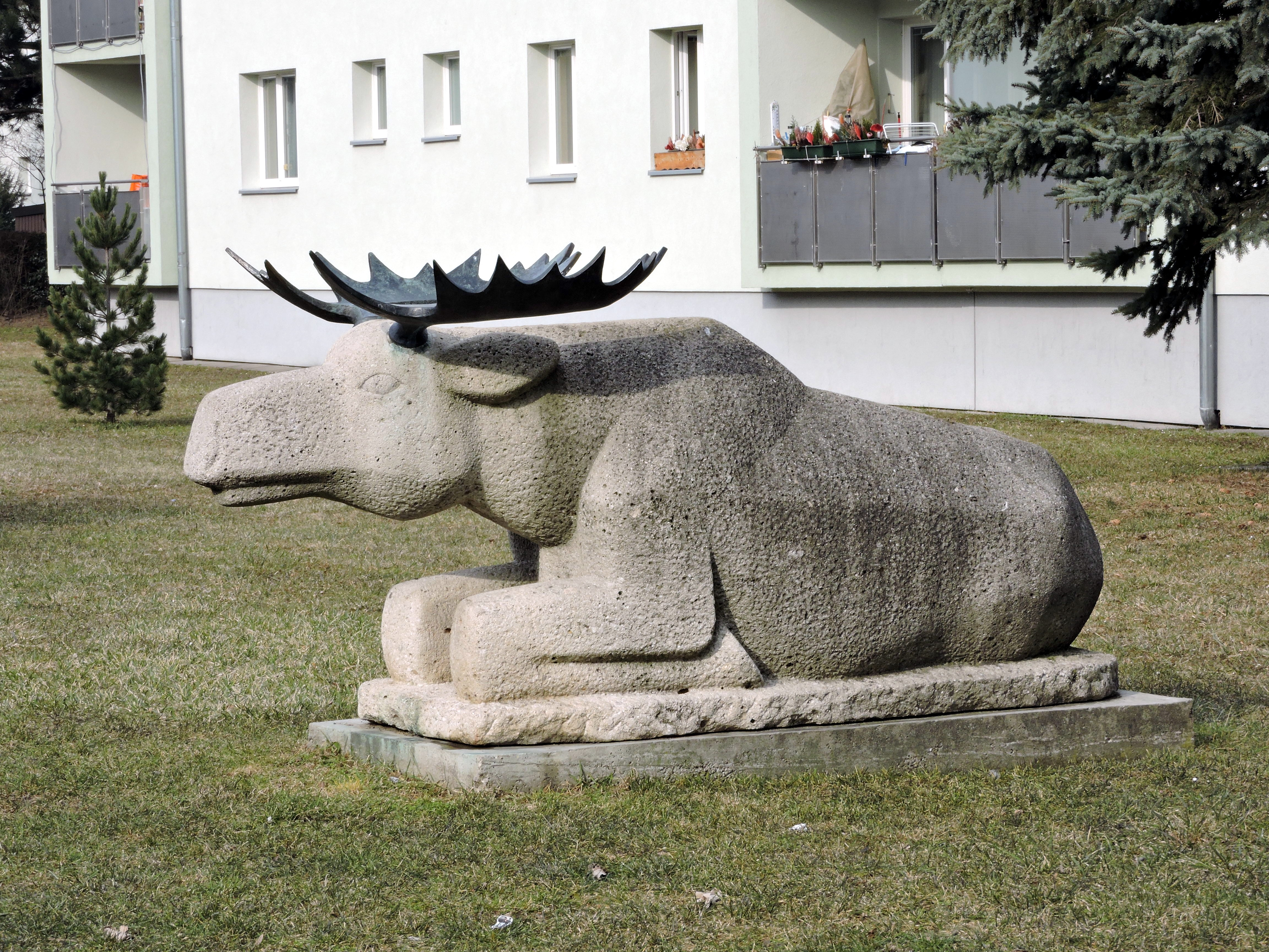 Elch - Plastik eines liegenden Elchs (Stein/Bronze)